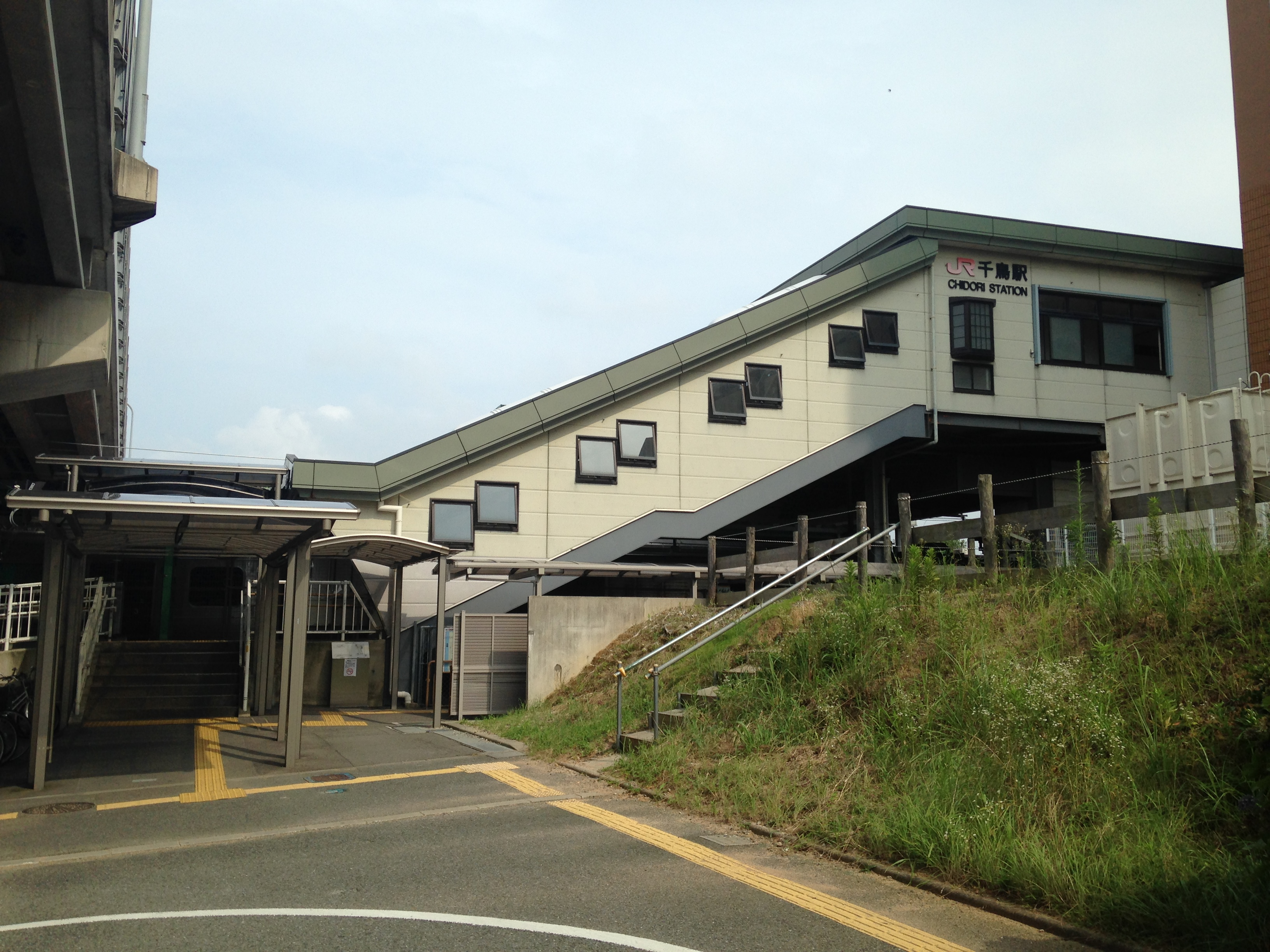 千鳥駅西口